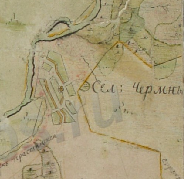 План генерального межевания Темниковского уезда Тамбовского наместничества. 1790г. Масштаб 1 верста в дюйме